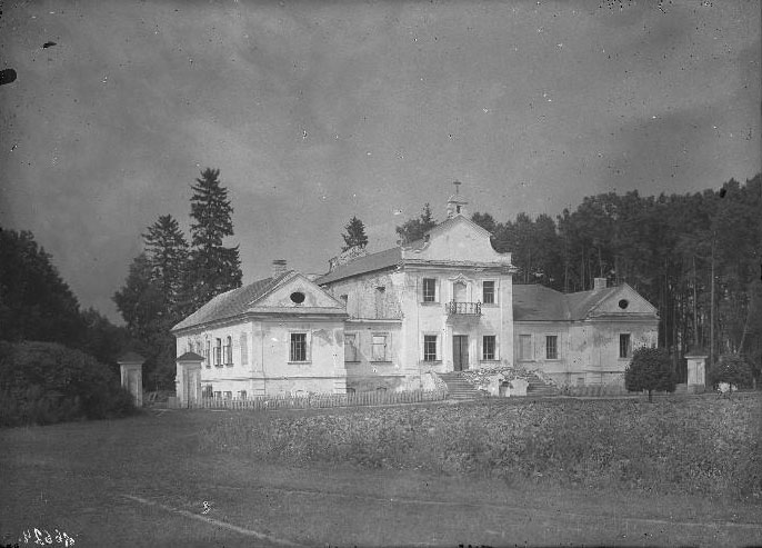 Беларуская (тарашкевіца): Лявонпаль (Lavonpal), сядзіба Лапацінскіх (Łapacinski)